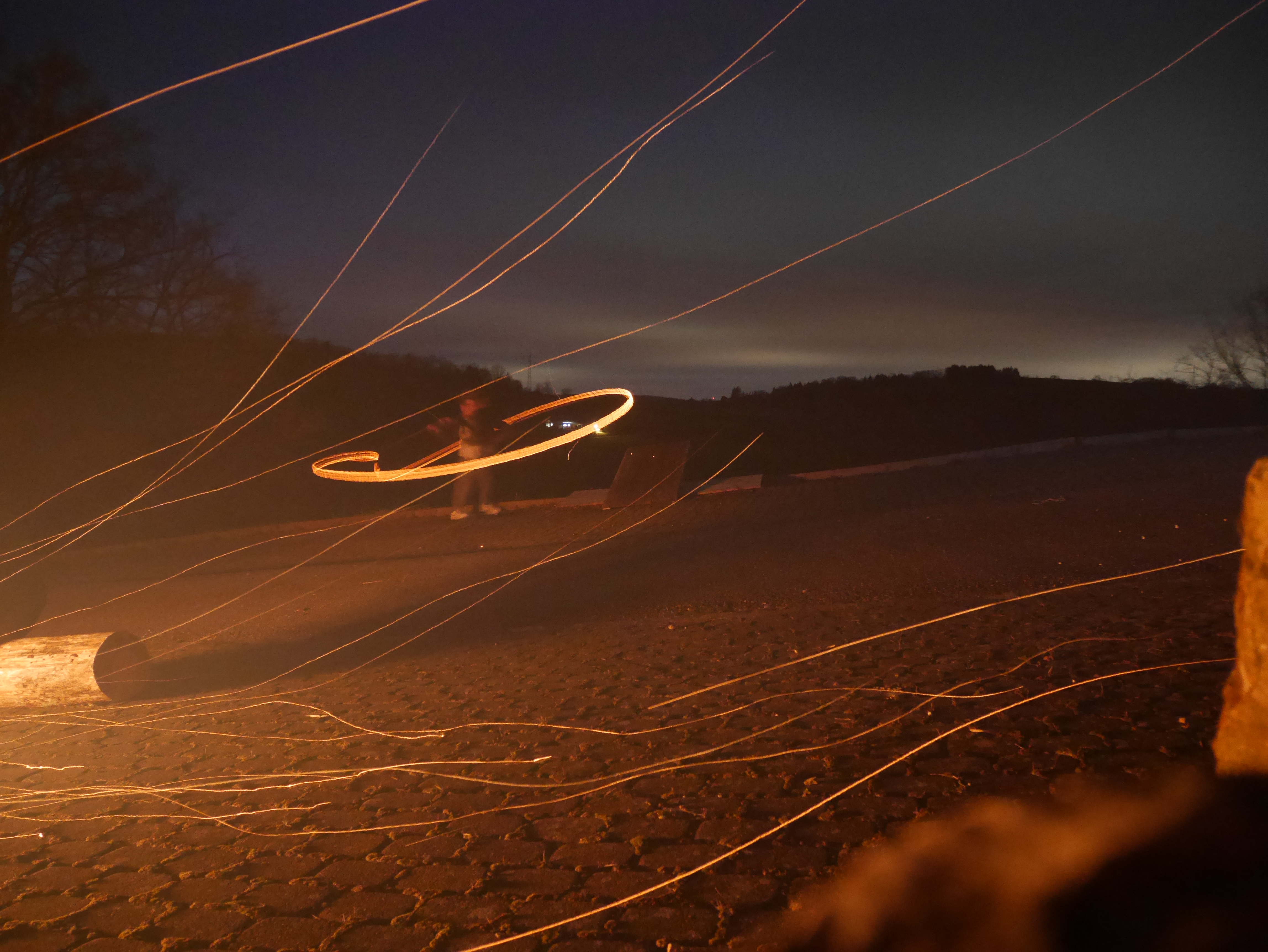 Scheibenschlagen Ersingen Schwung